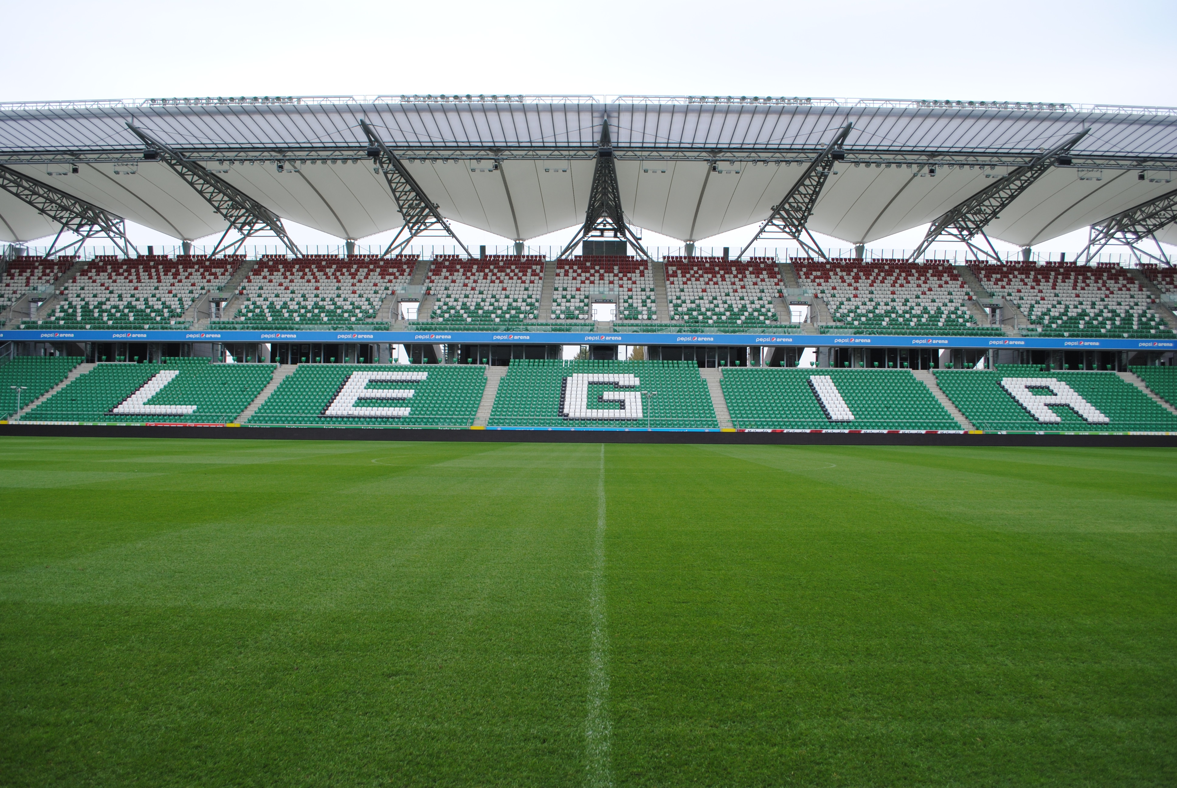 Stadion Legii Warszawa